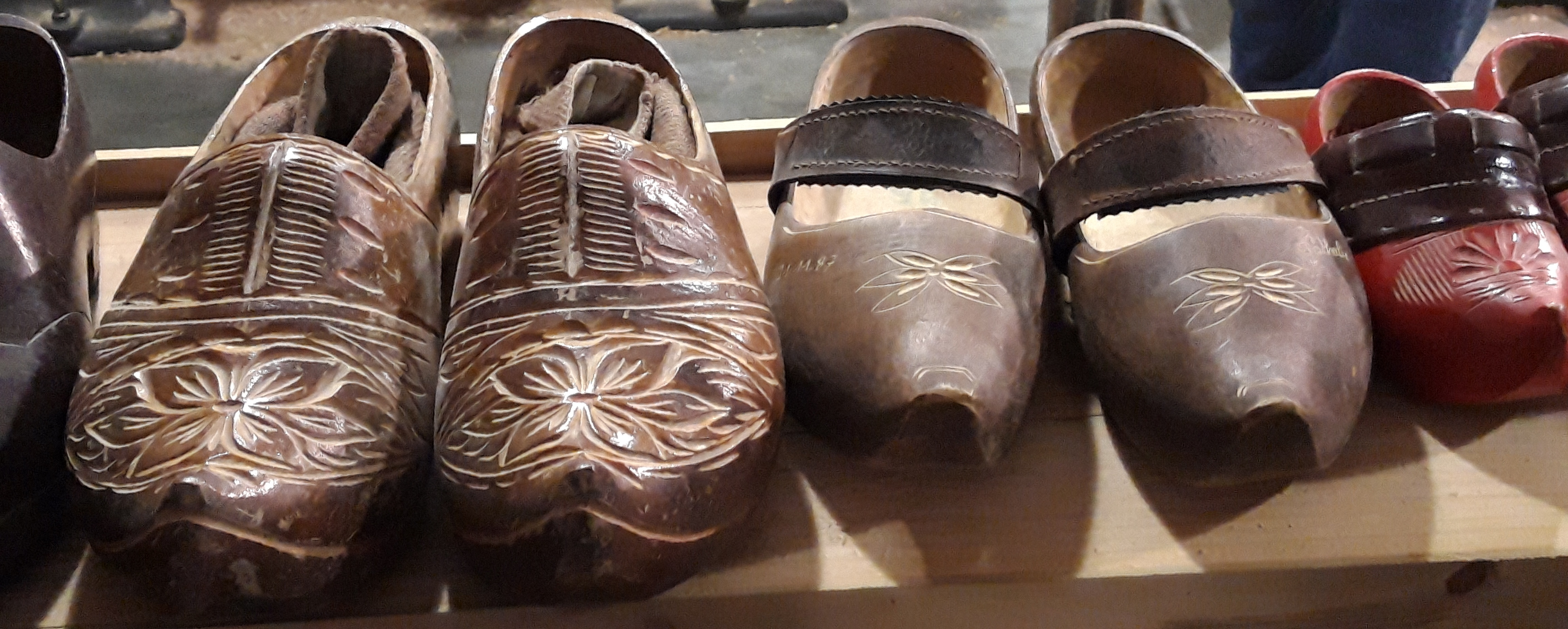 Sabots de luxe, musée des métiers du bois, Labaroche (Haut-Rhin)